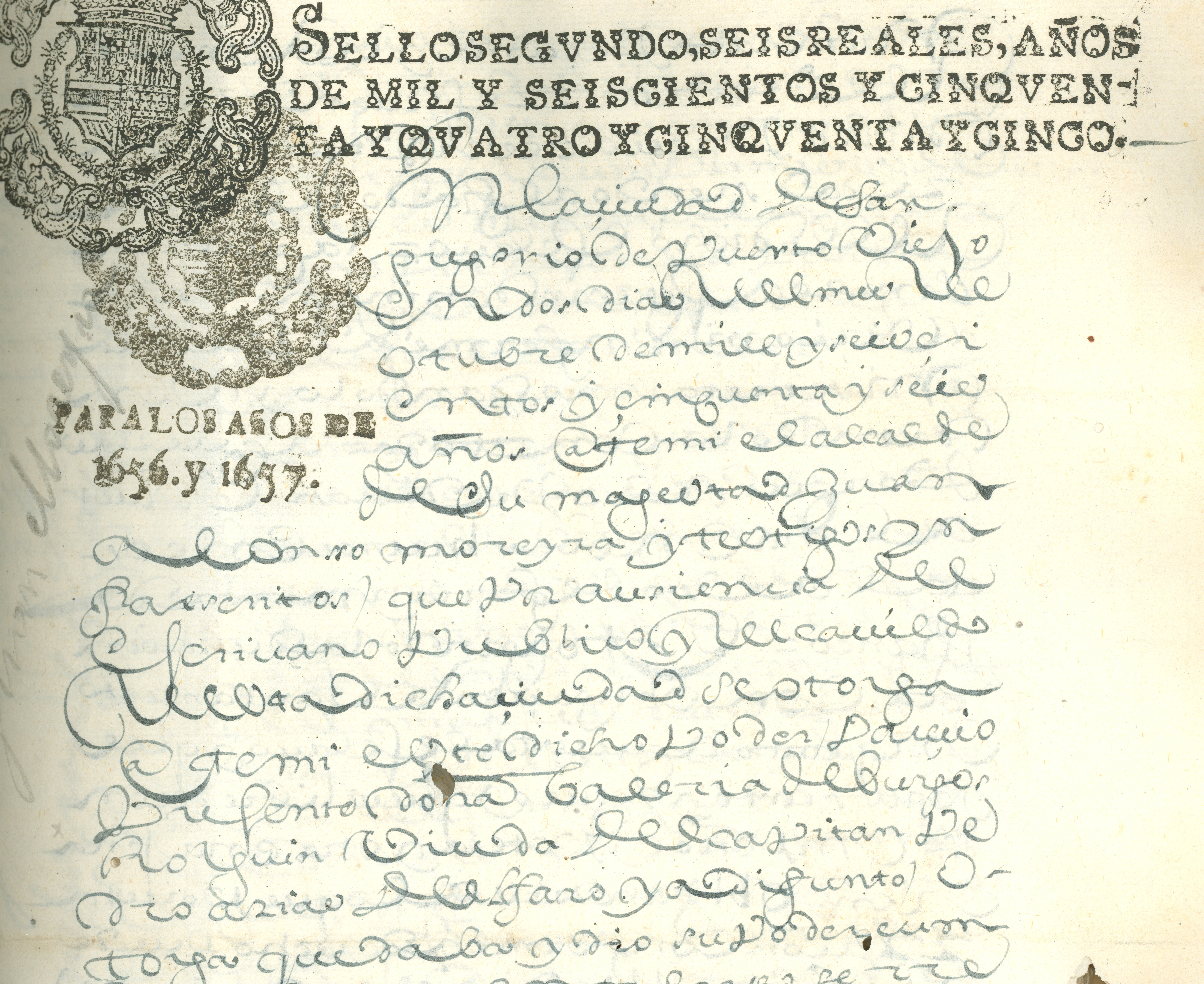 « En la Ciudad de San Gregorio de Puerto Viejo en dos días del mes de Octubre de mill y seiscientos y cinquenta y seis años ante mí el Alcalde de Su Magestad Joan Alonsso Moreyra y testigos ynfrascritos que por ausencia del Escribano Público y de Cavildo de esta dicha Ciudad, se otorga ante mí este dicho poder da aviso?-avío presente Doña Valeria de Burgos Holguín, Viuda (y esposa que fue) del Capitán Pedro Arias de Alfaro ya difunto, otorga que daba e dio su poder cumplido qual en tal casso se requiere y es necessario a Don Pedro de Alvia Pedrosso Vezino de esta dicha Ciudad […]» Diapositiva de consulta electronica disponible en los Fondos Documentales del Archivo Histórico del Guayas (AHG); Guayaquil, Ecuador.Consultado y compartido por el usuario J. Javier García A.